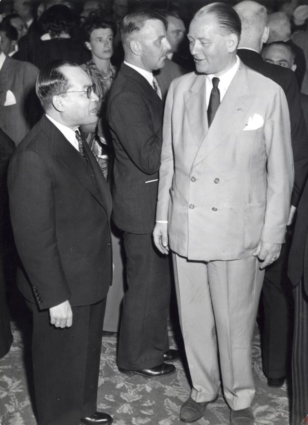 Dirk Stikker, bankier, diplomaat en politicus (VVD). In 1961 werd hij Secretaris _ Generaal van de NATO. Hier tijdens een Ronde tafel conferentie in gesprek met Mohammed Hatta. Den Haag, 25 augustus 1949.